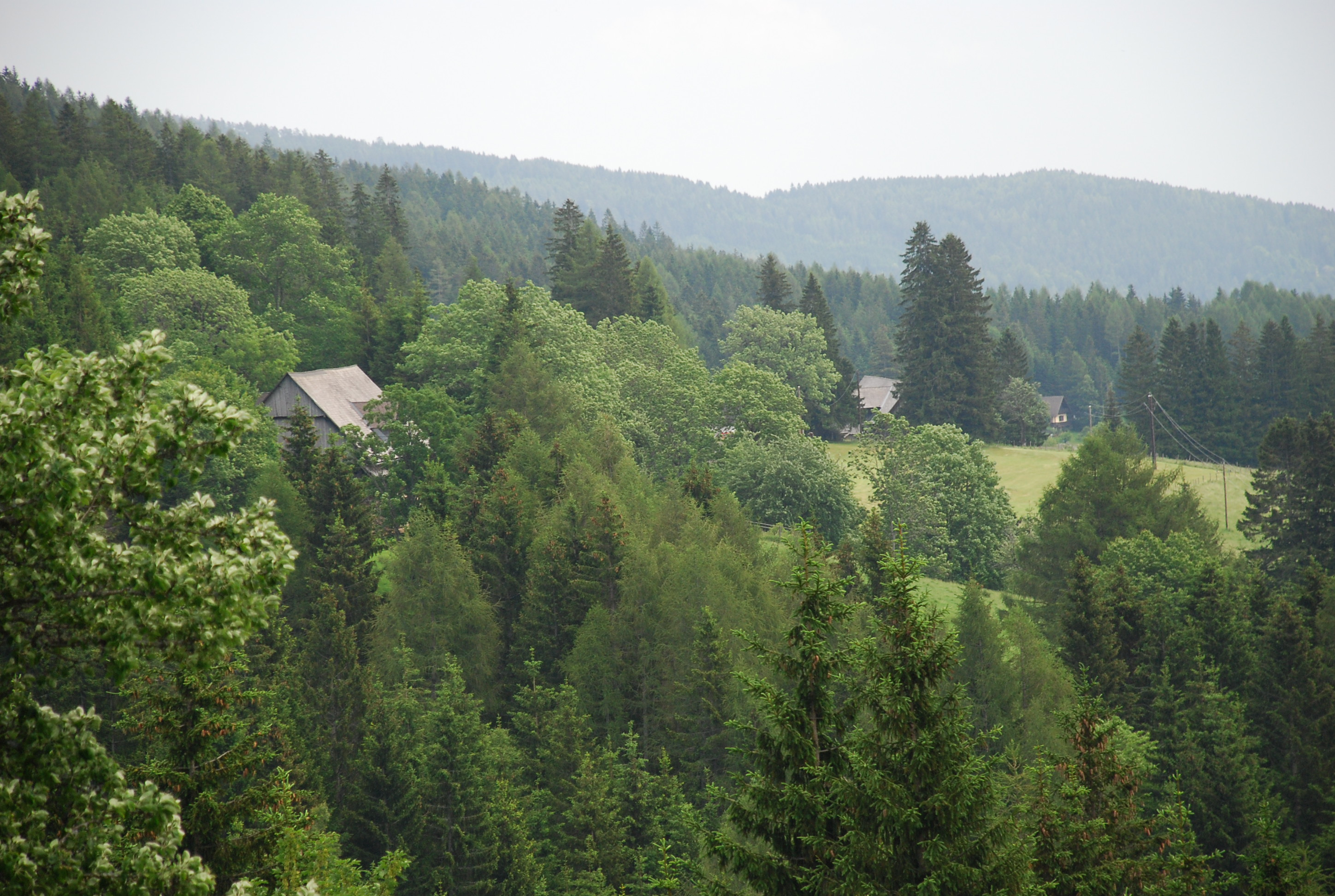 Rettenbach, Dächer vlg. Strehly und Ircher mit Wetterschutzbäumen